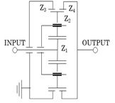 不思議遊星歯車減速機の説明図